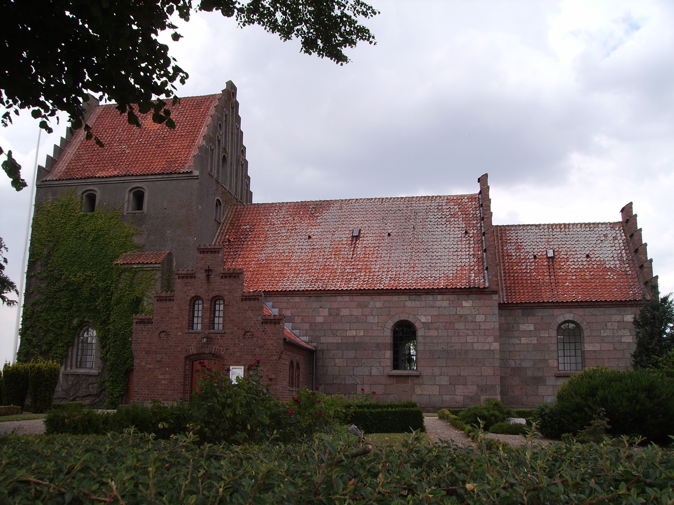 Nørre Nærå Kirke, Nørre Nærå Sogn, Skam Herred, Odense Amt, Denmark (Danish Church) - Nørre Nærå Kirke fra syd